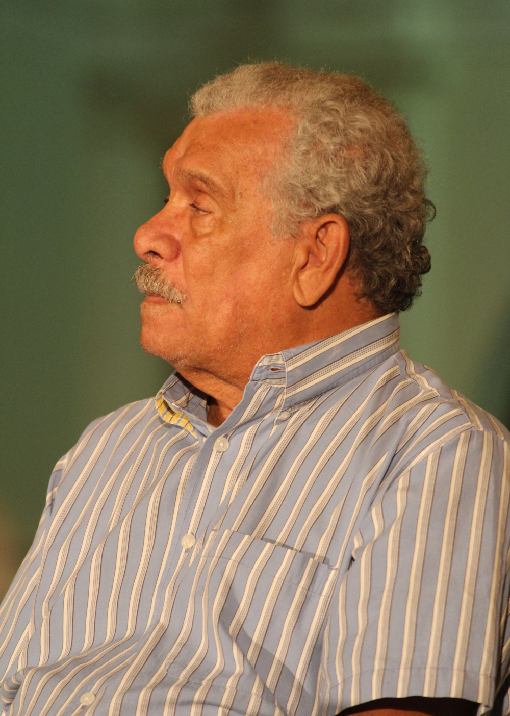 VIII Festival Internacional de Poesía en Granada: Derek Walcott (Santa Lucía).